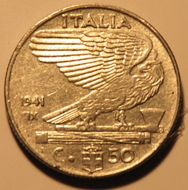 Rovescio di una moneta da 50 centesimi di lira italiana del 1941 (IX) della serie Impero con l'aquila e il fascio.